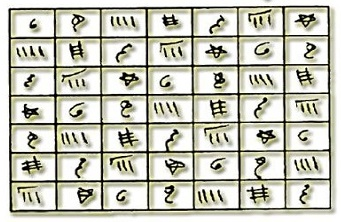 جدول شرف شمس